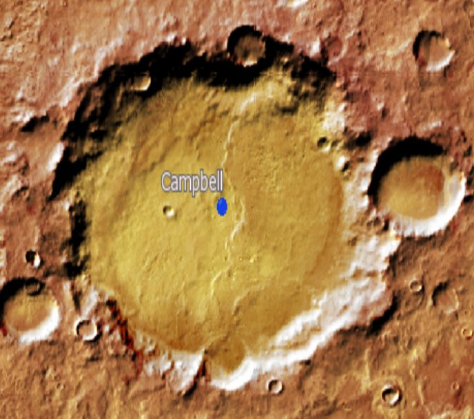 Cráter marciano Campbell. (Imagen IAU/USGS/Goddard/A SU/USGS)